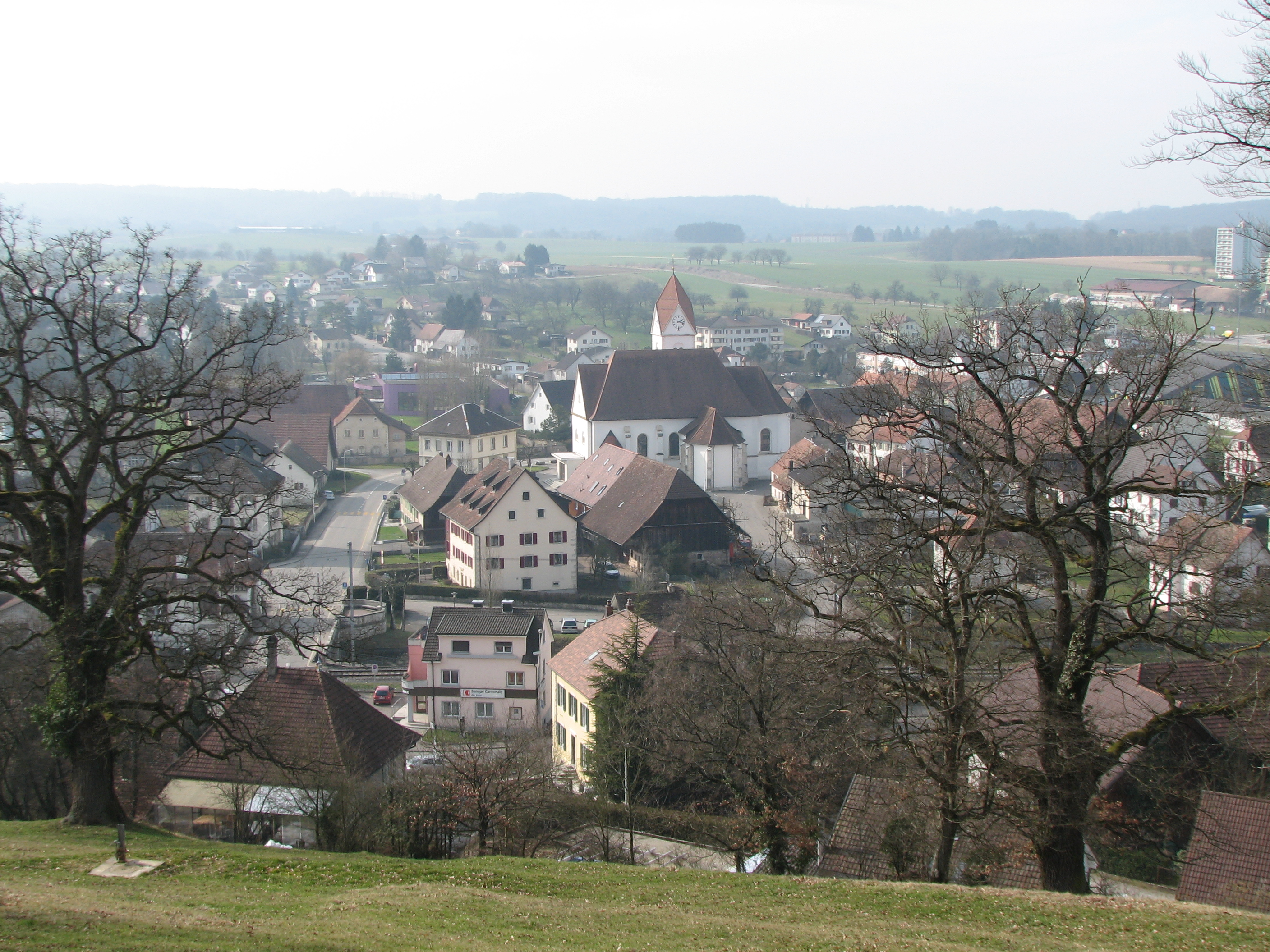 Boncourt vue générale, canton du Jura, Suisse